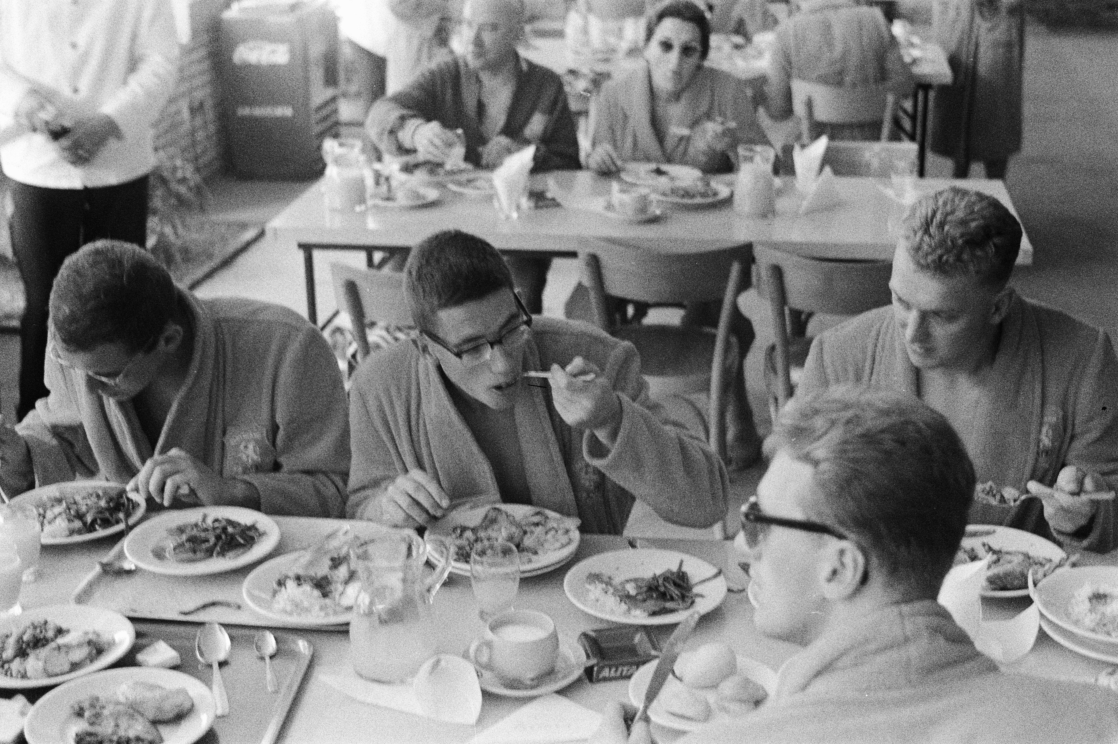 Collectie / Archief : Fotocollectie Anefo Reportage / Serie : [ onbekend ] Beschrijving : Olympische Spelen te Rome, zwemmers aan de maaltijd, v.l.n.r. Korteweg, Kroon , Mensonides (op de rug) Bouwman Datum : 22 augustus 1960 Locatie : Rome Trefwoorden : atleten, restaurants Persoonsnaam : Bouwman, Jan, Korteweg, Gerrit, Kroon, Ron, Mensonides, Wieger Fotograaf : Pot, Harry / Anefo Auteursrechthebbende : Nationaal Archief Materiaalsoort : Negatief (zwart/wit) Nummer archiefinventaris : bekijk toegang 2.24.01.05 Bestanddeelnummer : 911-5220